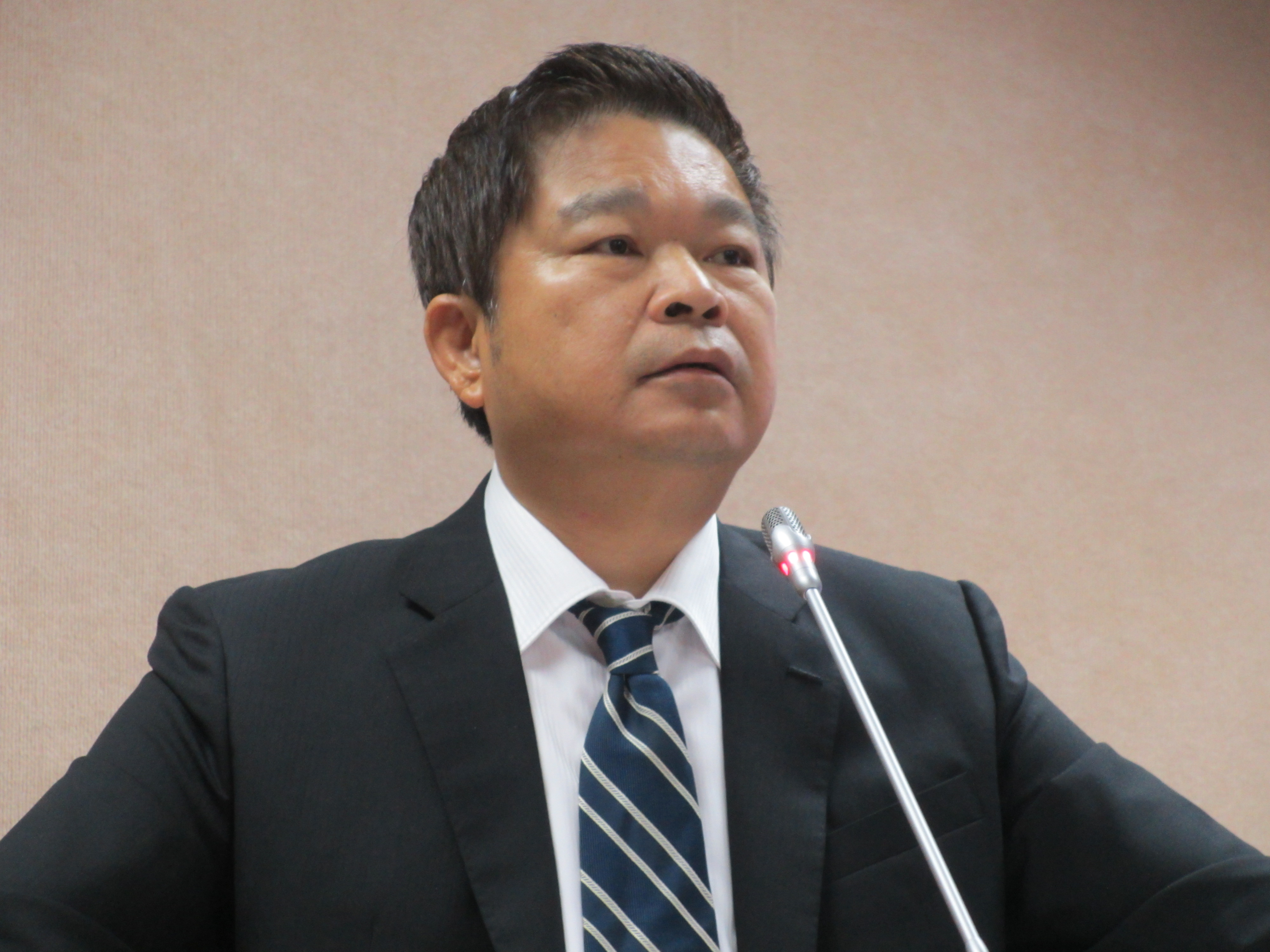 台灣在野黨民進黨立委蔡煌瑯(美國之音張永泰拍攝)